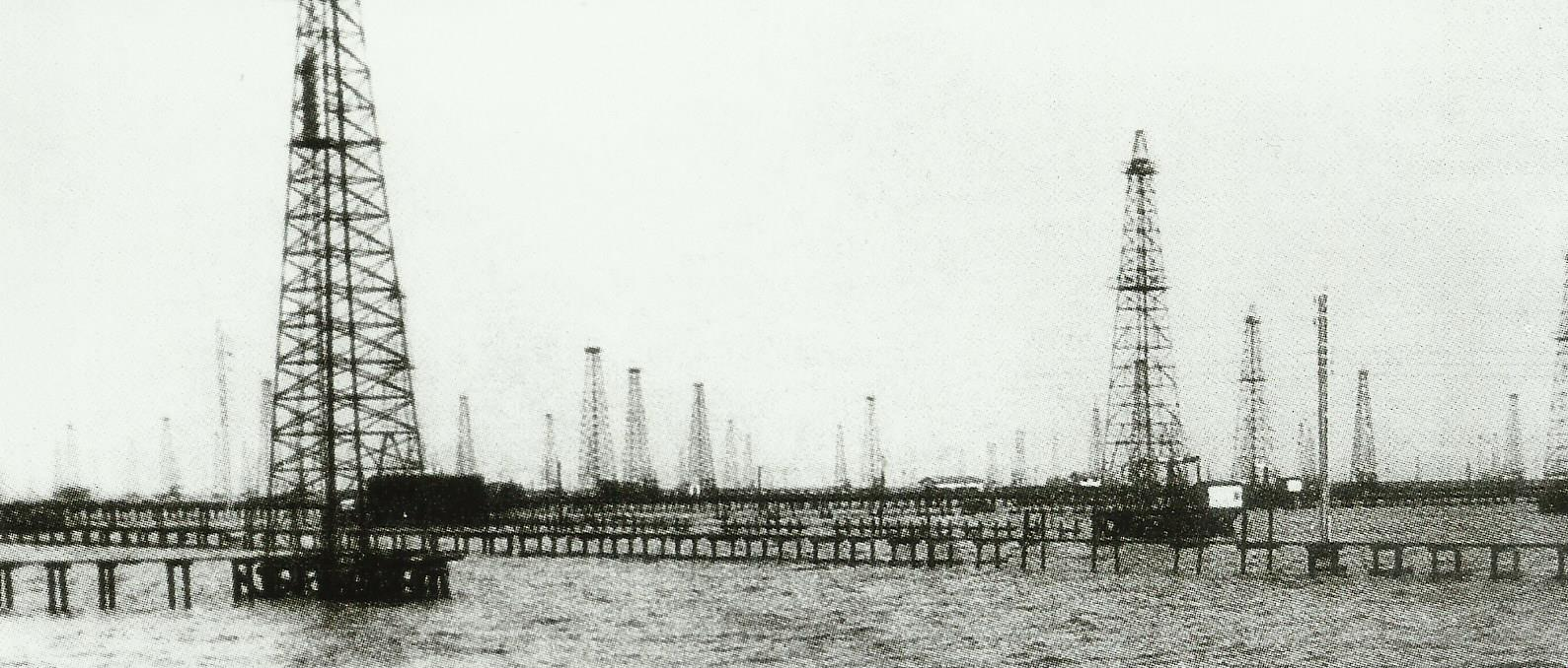 Pozos petroleros en el lago de Maracaibo, mayor centro de extracción de hidrocarburos de Venezuela a principios del siglo XX. Maracaibo, Estado Zulia, Venezuela.